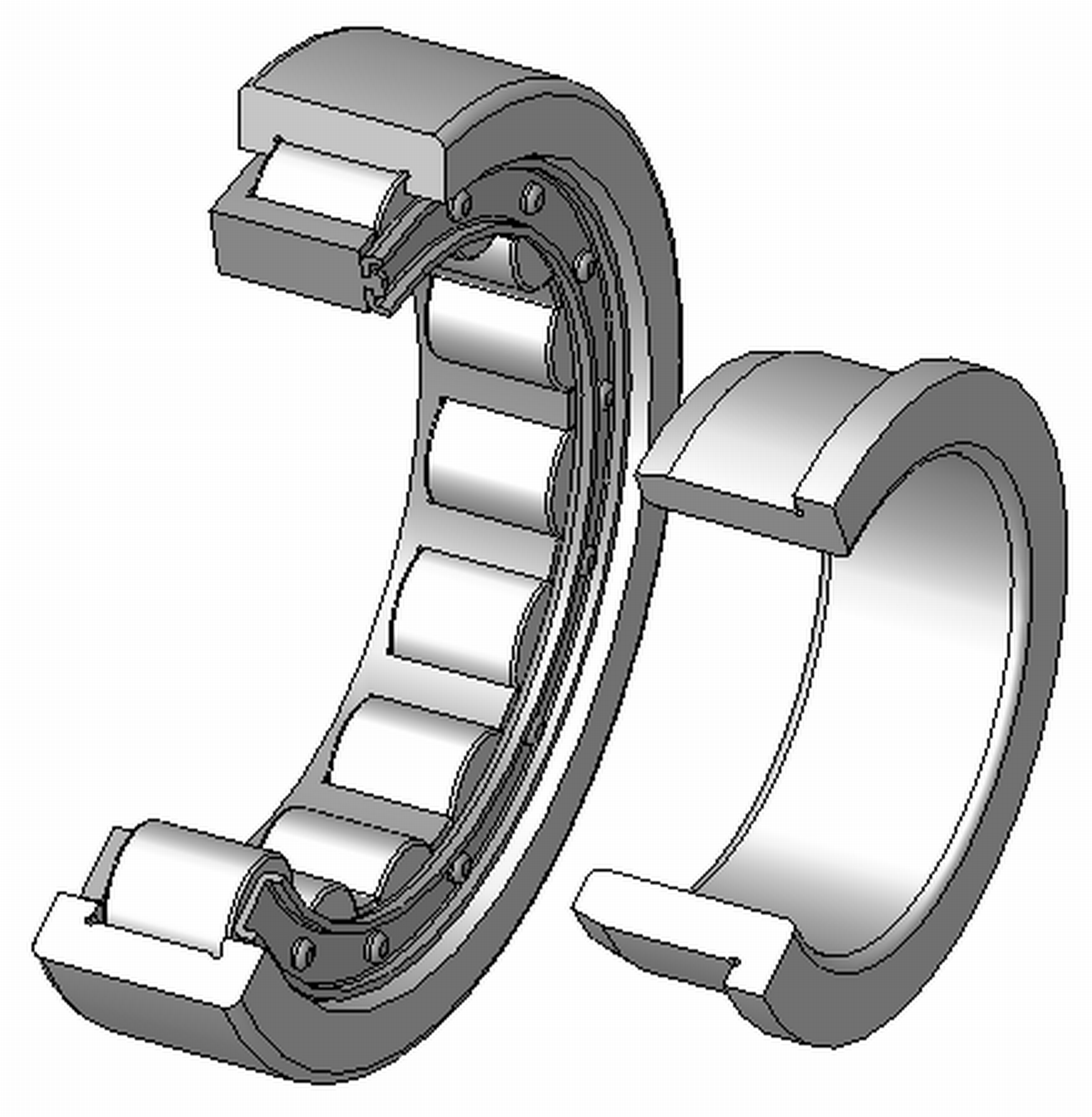 Zylinderrollenlager, Innenring mit einem Bord, Aussenring mit zwei Borden, Massivkäfig aus Stahl, zerlegbar, Explosionsdarstellung, 120°Schnitt, Hinweis: Innenaufbau des Lagers (insbesondere des Kaefigs) variiert je nach Hersteller und Baugroesse rolling contact bearings